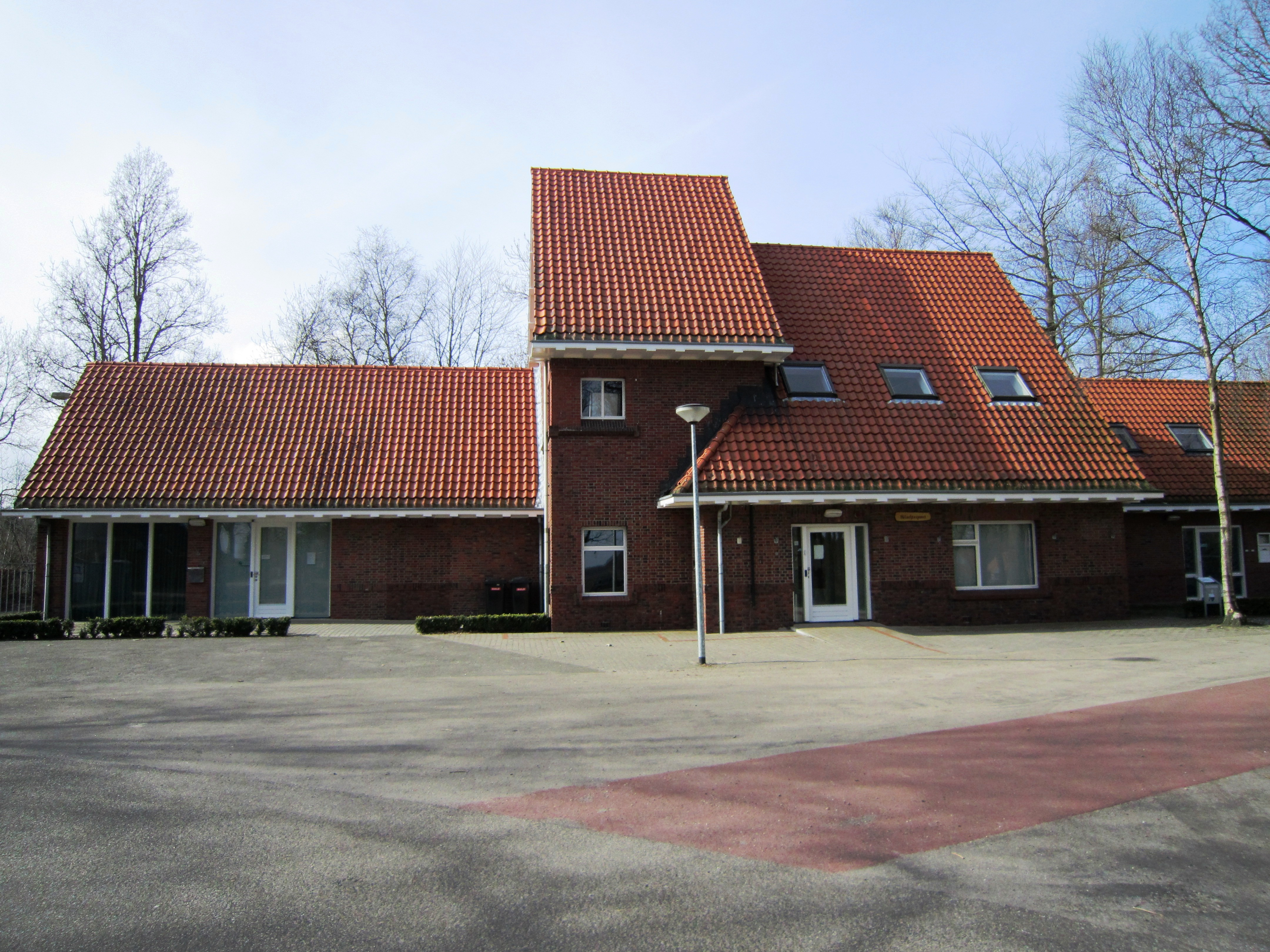 Slochteren IPA 3